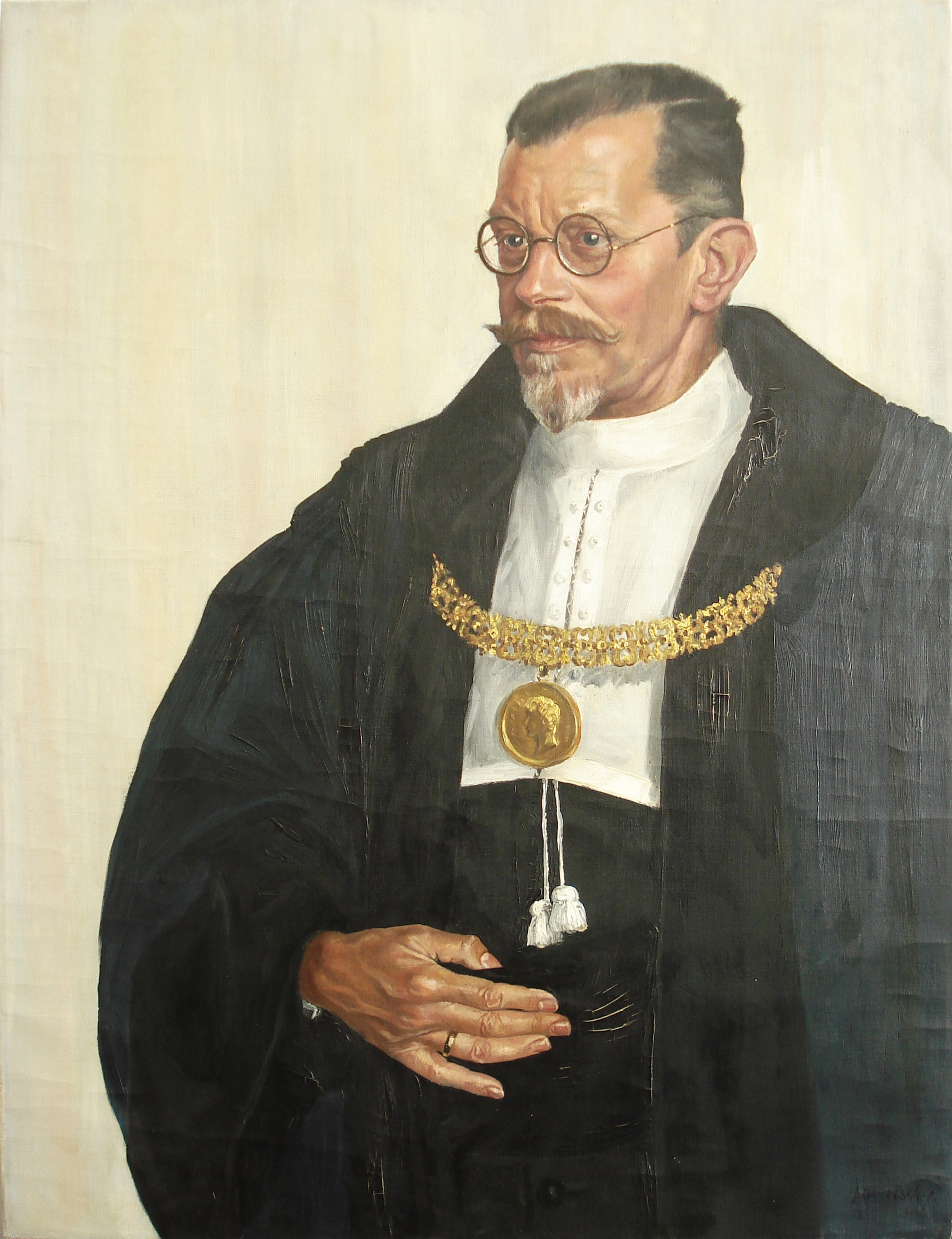 Albert Rehm (1871–1949), Professor für Klassische Philologie und Pädagogik an der Universität München, während seines Rektorats (1930/1931).